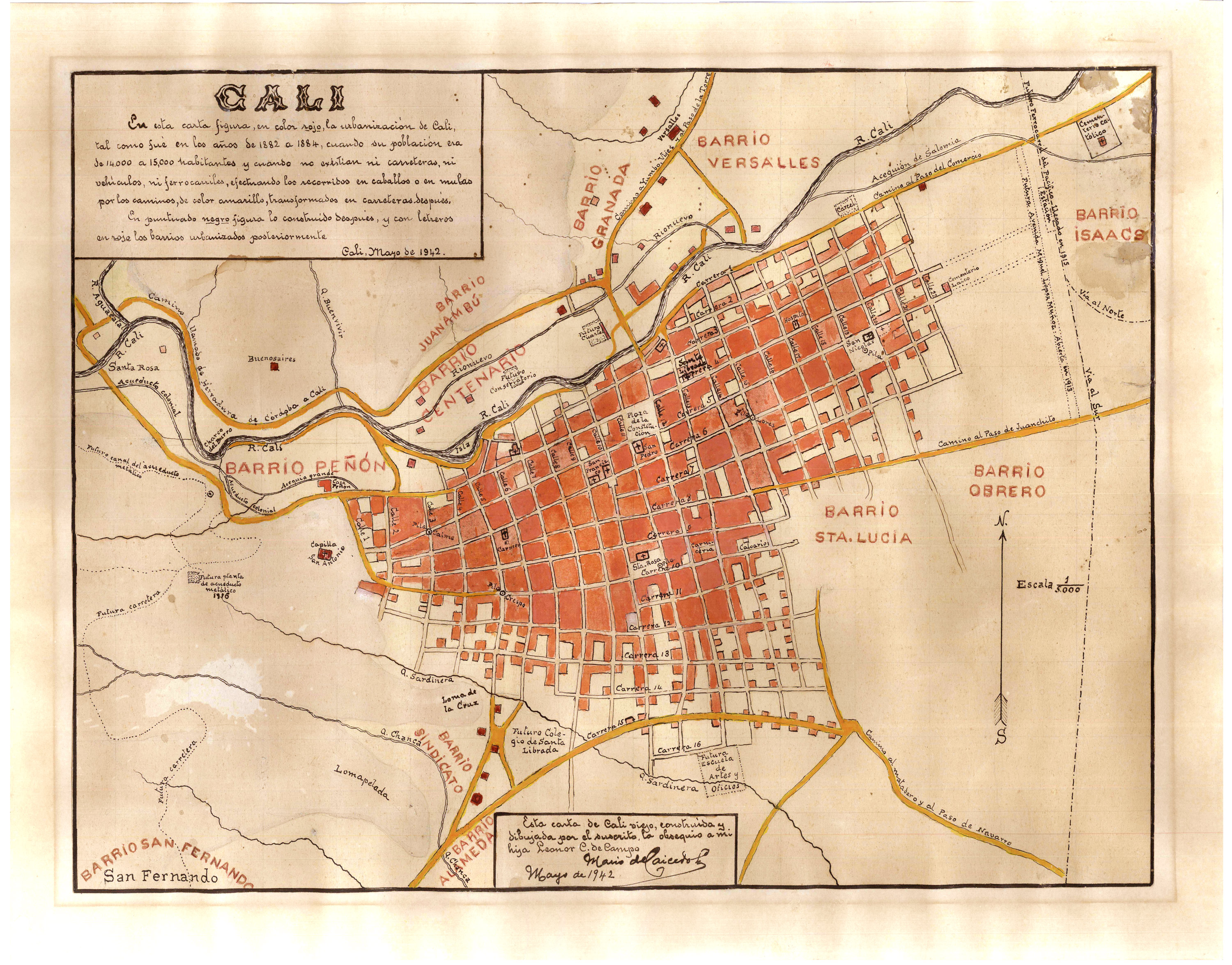 En esta carta figura, en color rojo, la urbanización de Cali, tal como fue en los años de 1882 a 1884, cuando su población era de 14,000 a 15,000 habitantes y cuando no existían ni carreteras, ni vehículos, ni ferrocarriles, efectuando los recorridos a caballo o en mulas por los caminos, de color amarillo, transformados en carreteras después. En puntado negro figura lo construido después, y con letreros rojos los barrios urbanizados posteriormente. Esta carta del Cali viejo, construida y dibujada por el suscrito, la obsequio a mi hija Leonor C. de Campo. Mario de Caicedo L. Mayo de 1942